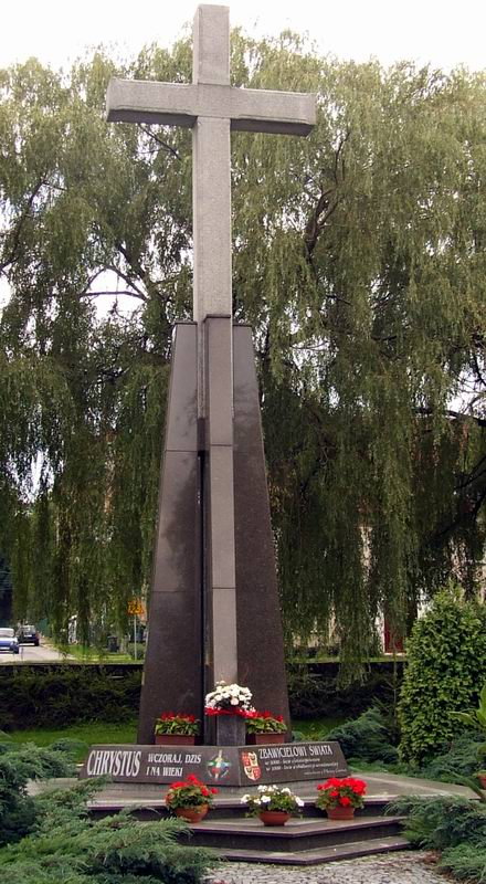 Piława Górna